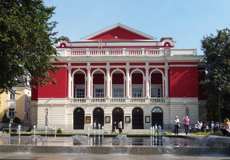 Операта в Русе. Ruse opera house.